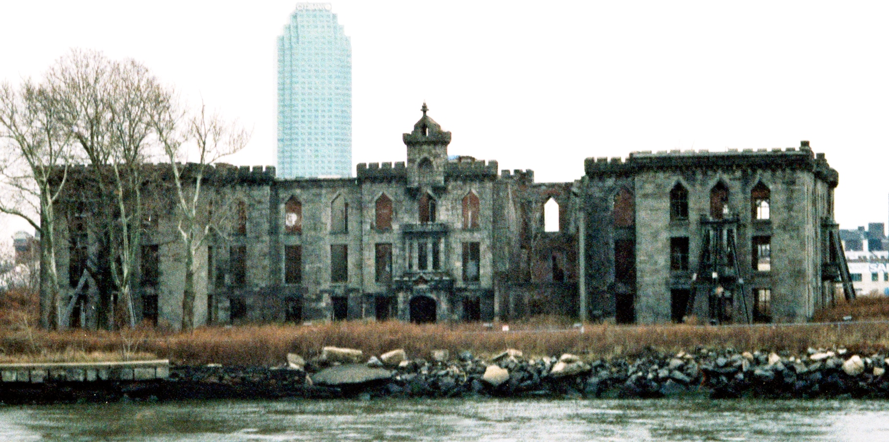 New York City, Roosevelt Island, Smallpox Hospital, Eingangsfront